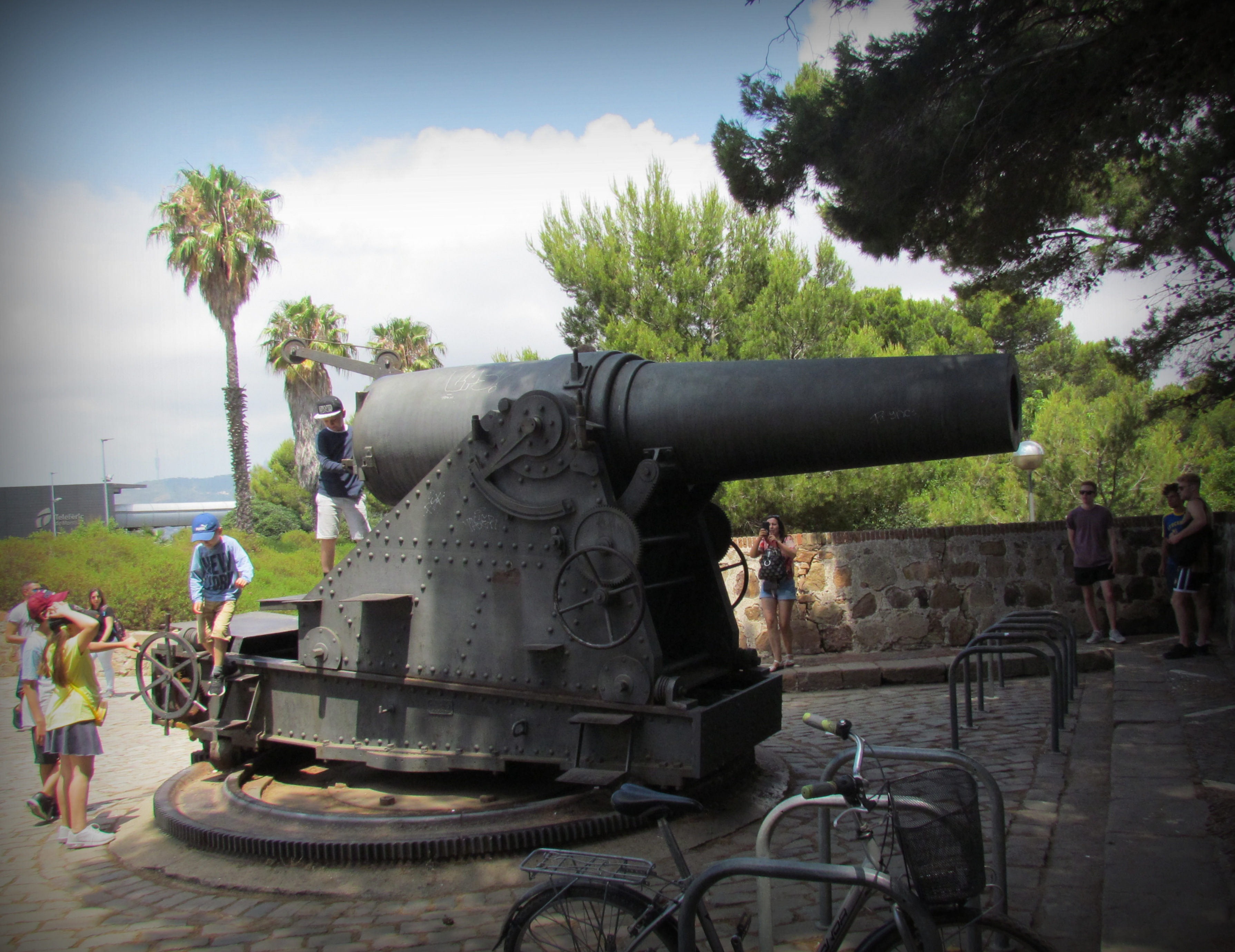 Canon au château de Montjuïc à Barcelone.